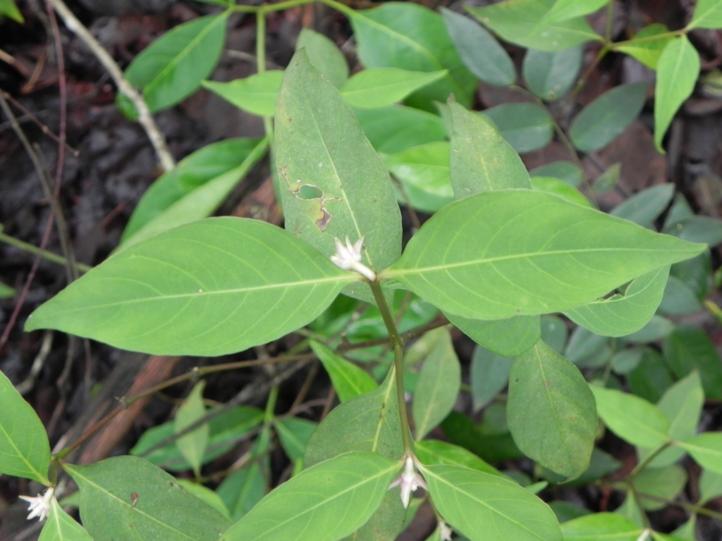 Psychotria hoffmannseggiana (Willd. ex Schult.) Müll.Arg. - RUBIACEAE - Jardim Botânico de Brasília - Brasília - Distrito Federal - Brasil.